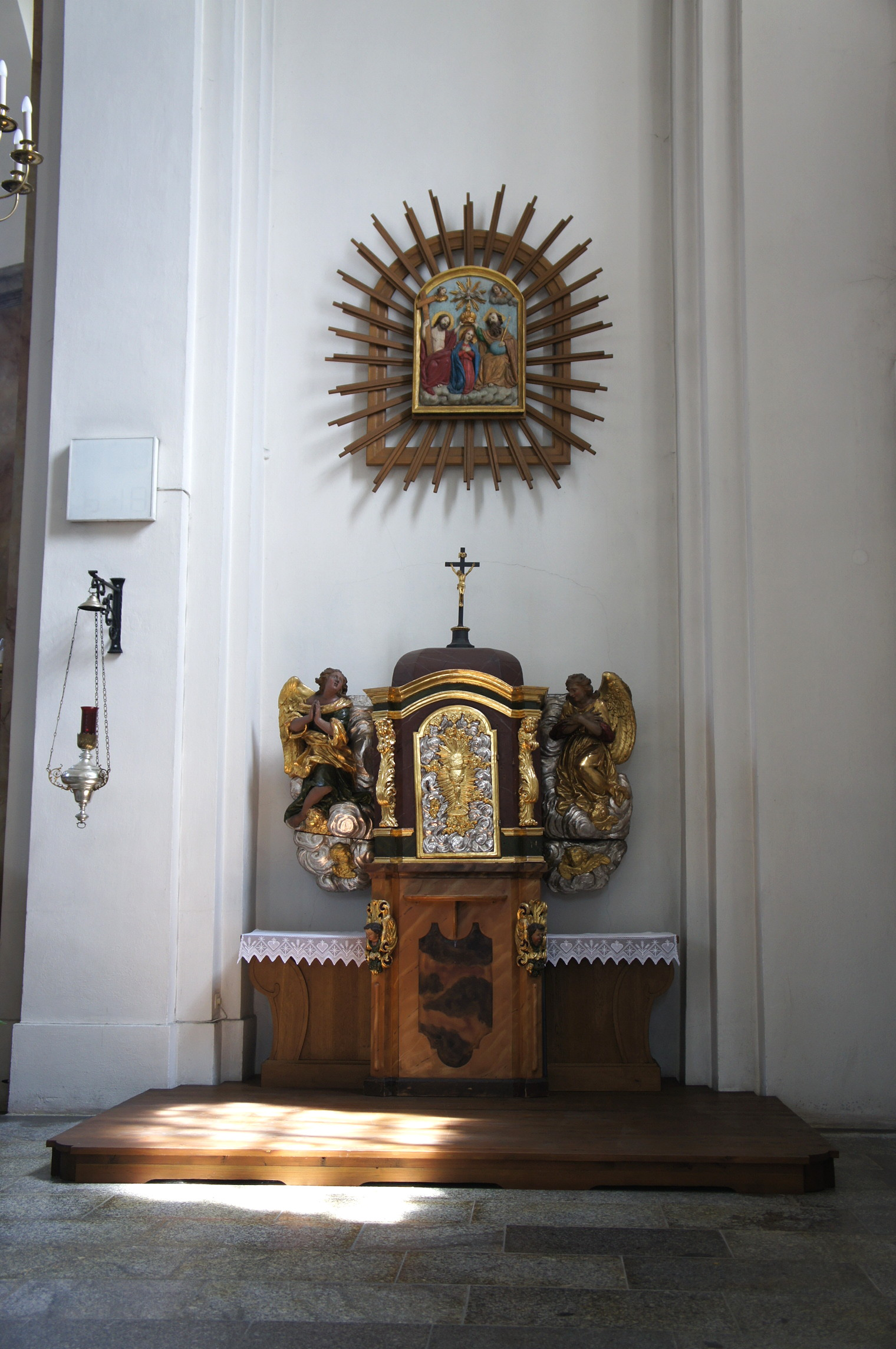 Katholische Wallfahrtskirche Rosenthal. Vorgängerkapelle wurde 1600 erbaut, die dreischiffige Hallenkirche stammt aus dem Jahr 1778. Abgebrannt am 1. Mai 1945 bis auf die Mauern und das Deckengewölbe, dabei konnte das Gnadenbild gerettet werden. 1947 wieder eingeweiht, Außenerneuerung 1979/80, Innenerneuerung 1987. Sakramentsaltar, 18. Jh.